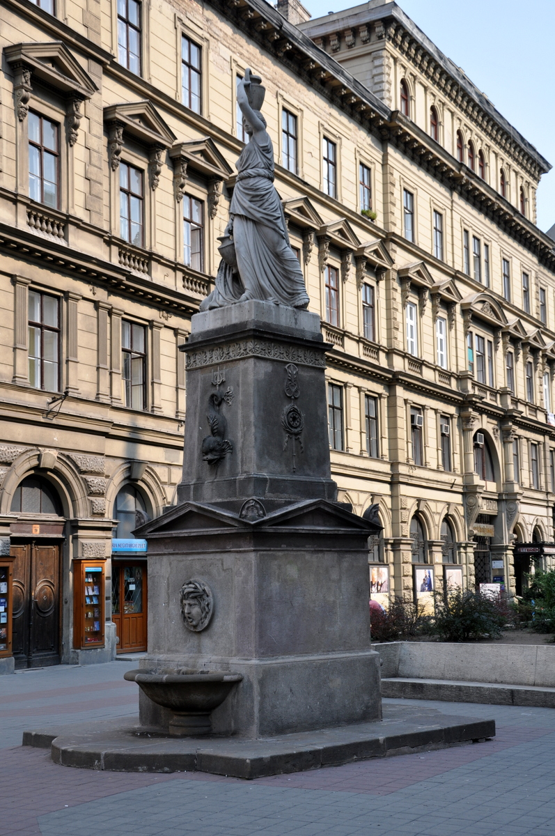 Fountain of the Nereids, Franciscan Square, Budapest